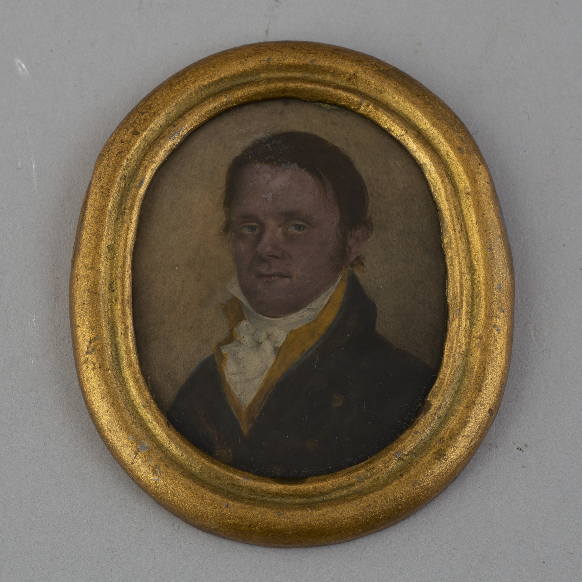 Porträtt av Laurentius Segerlind (1774-1834), avporträtterad ca år 1810 av okänd konstnär.